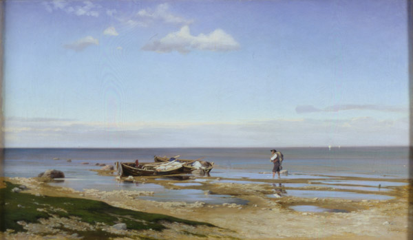 Kalapaadid